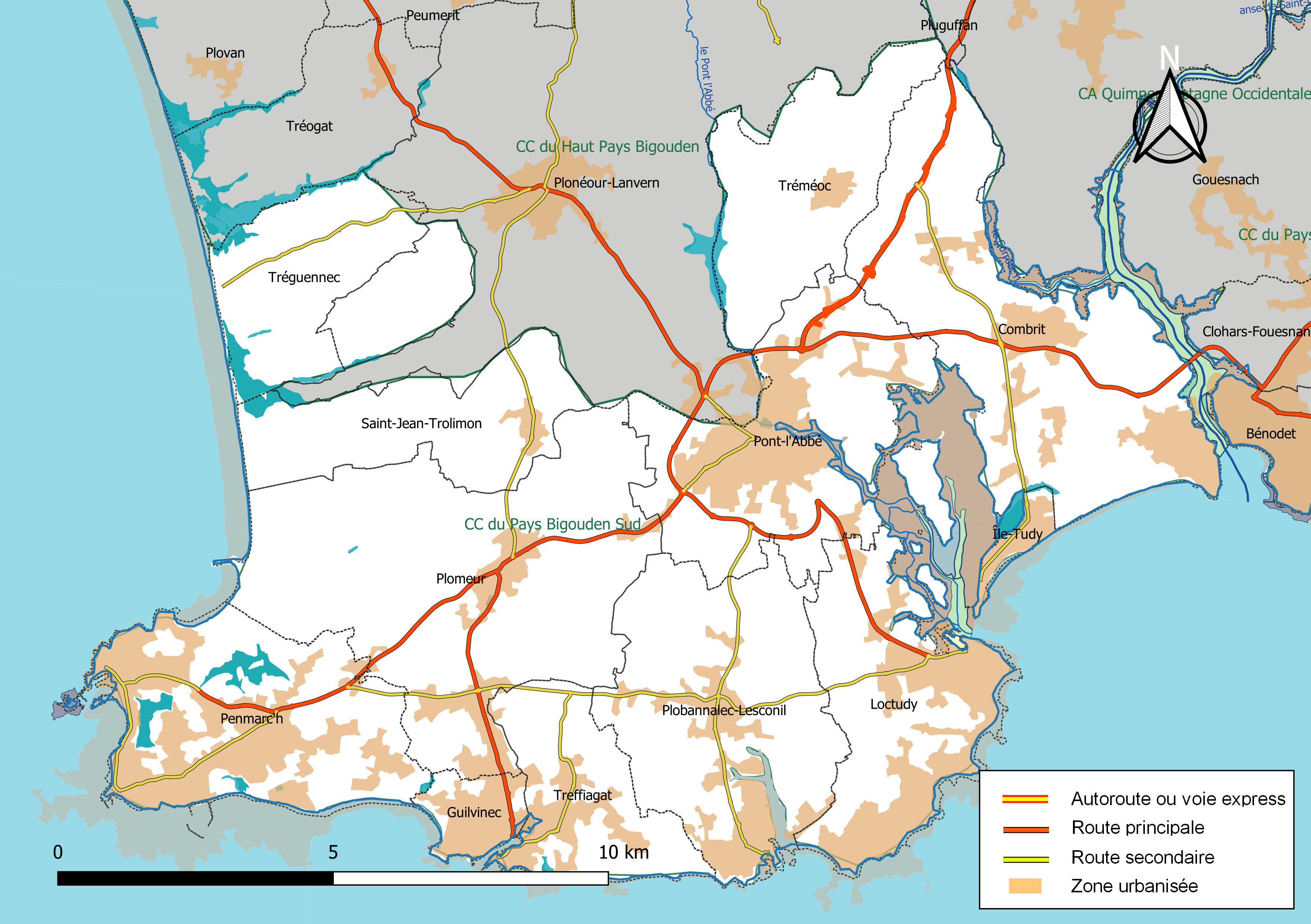 Carte géographique de la Communauté de communes du Pays Bigouden Sud, département du Finistère, France. Composition au 1er janvier 2019.